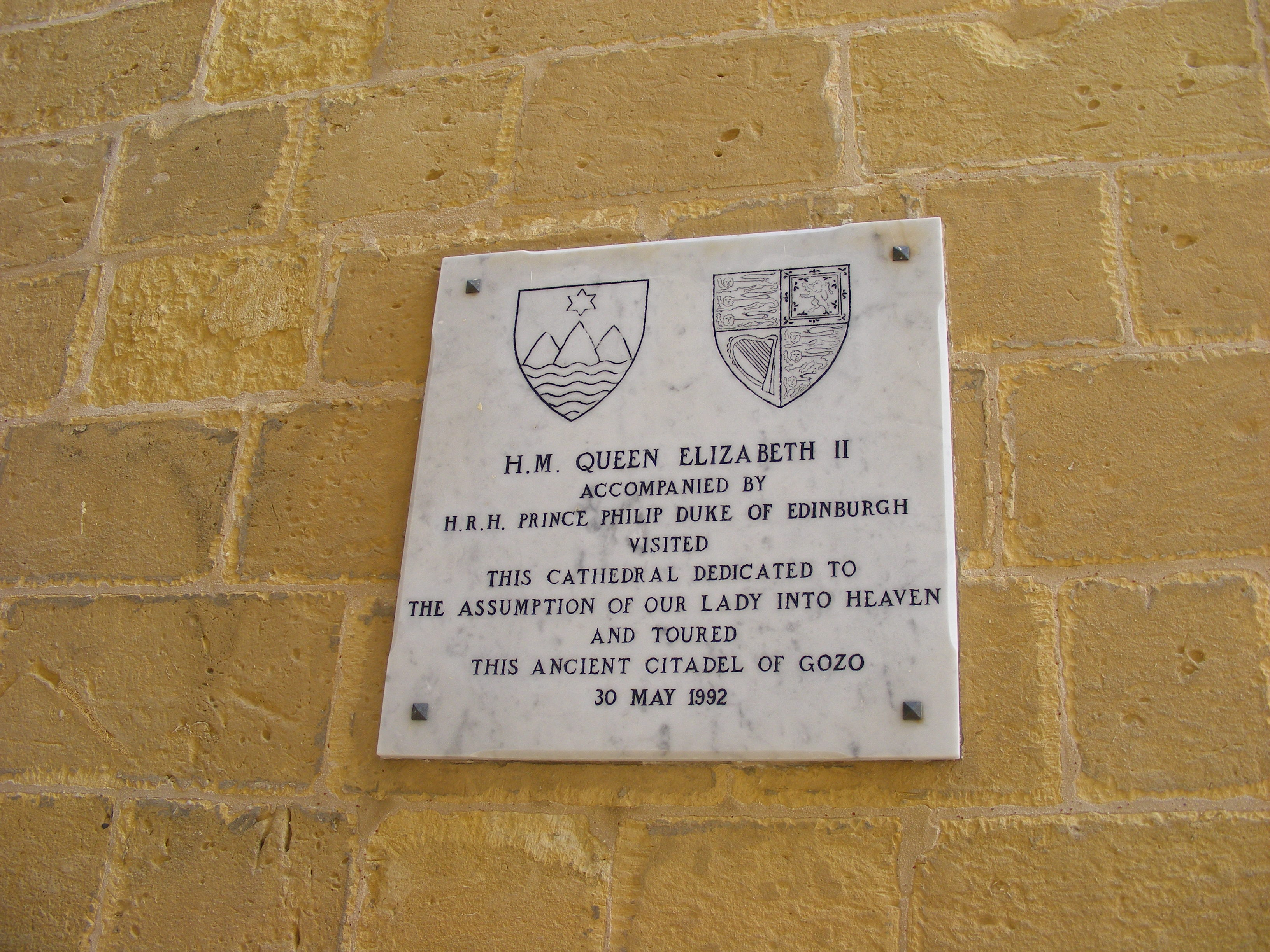 Tablica na zewnątrz katedry, obok bocznego wejścia, upamiętnia wizytę brytyjskiej pary królewskiej w katedrze 30 maja 1992.